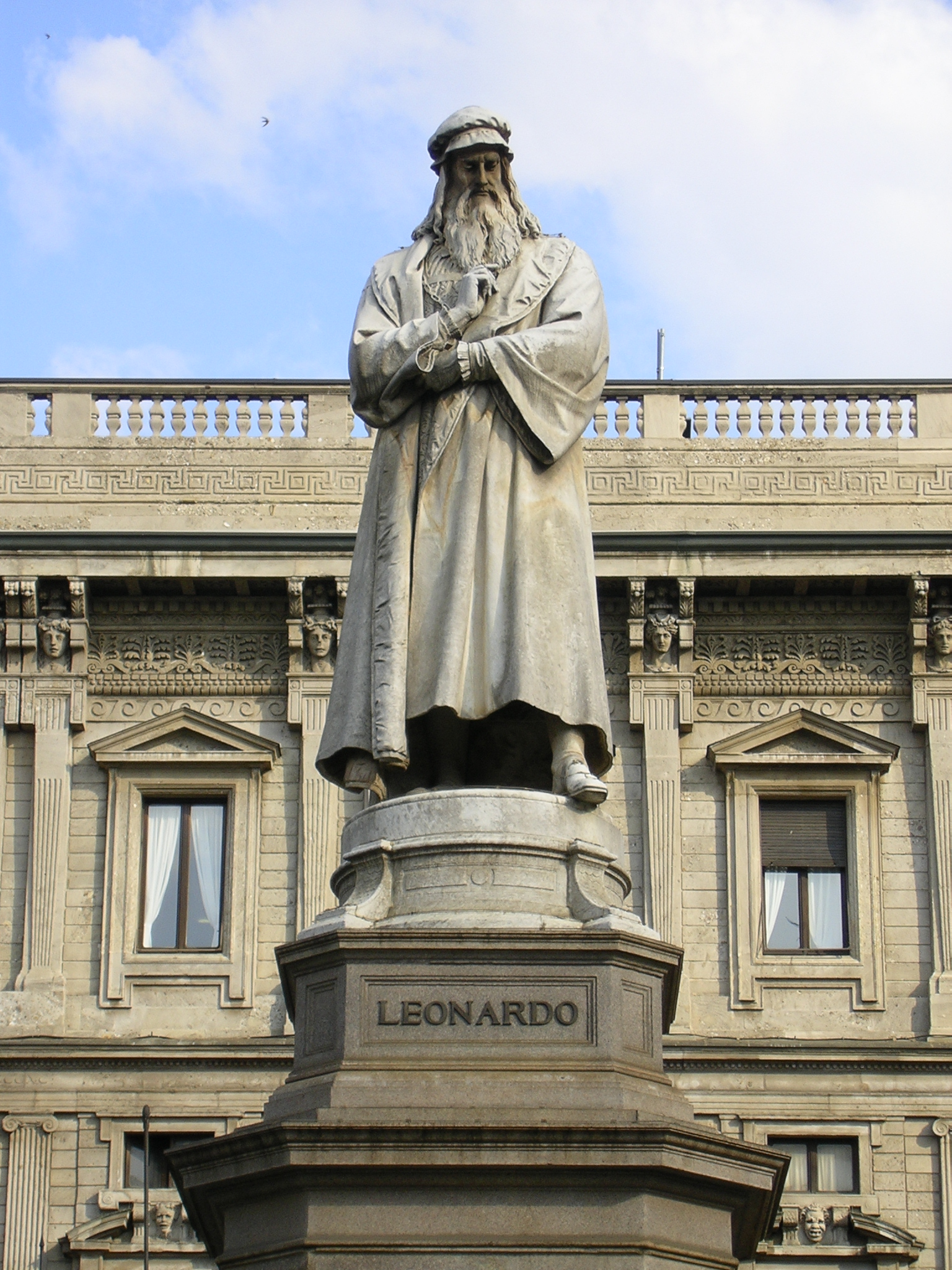 Monumento a Leonardo da Vinci in Piazza della Scala a Milano.